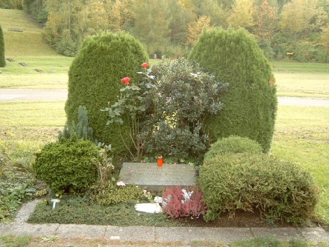 Grabstätte Andreas Baader, Gudrun Ensslin und Jan Carl Raspe auf dem Dornhaldenfriedhof in Stuttgart - Degerloch